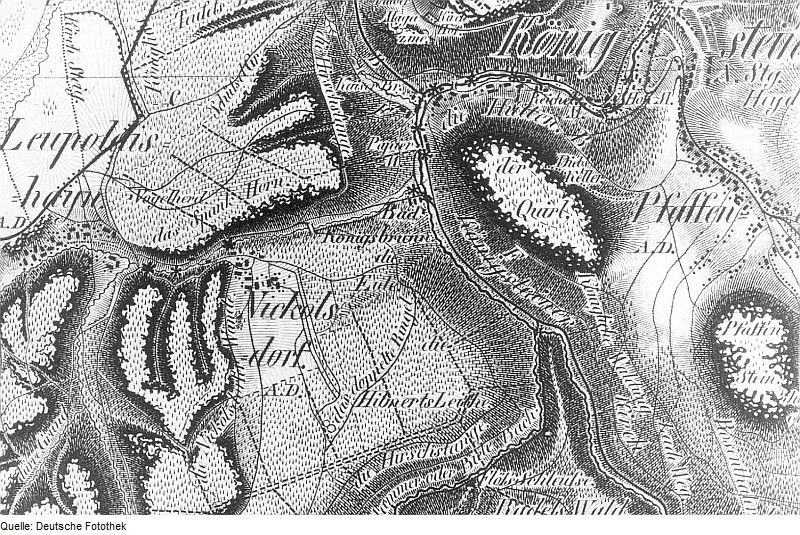 Original image description from the Deutsche FotothekKönigstein/Sächs. Schweiz-Leupoldishain. Oberreit, Sect. Stolpen, 1821/22